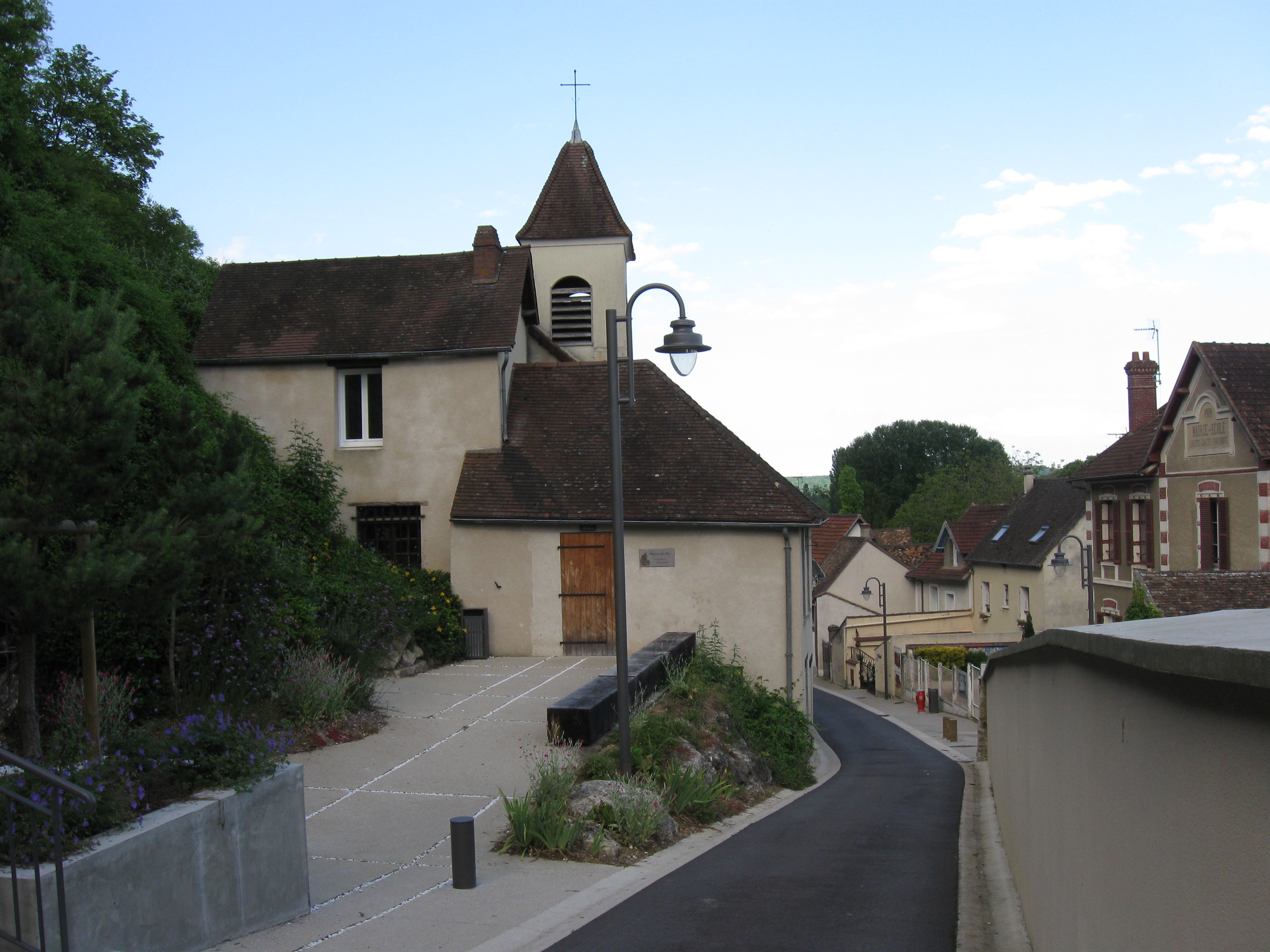 Rue principale et église de Méricourt. (département des Yvelines, région Île-de-France).